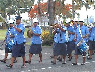 Polizeikapelle in Apia auf Samoa Selbst aufgenommen im Januar 2005 Sorry, das Bild ist so klein, weil es ein Auszug aus einem Videofilm ist. --Plenz 13:35, 9 December 2006 (UTC)???